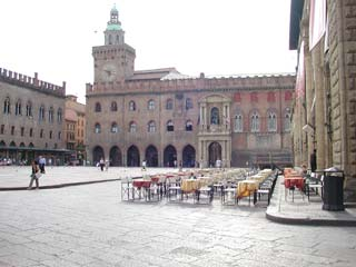 Palazzo d'Accursio in Piazza Maggiore a Bologna.